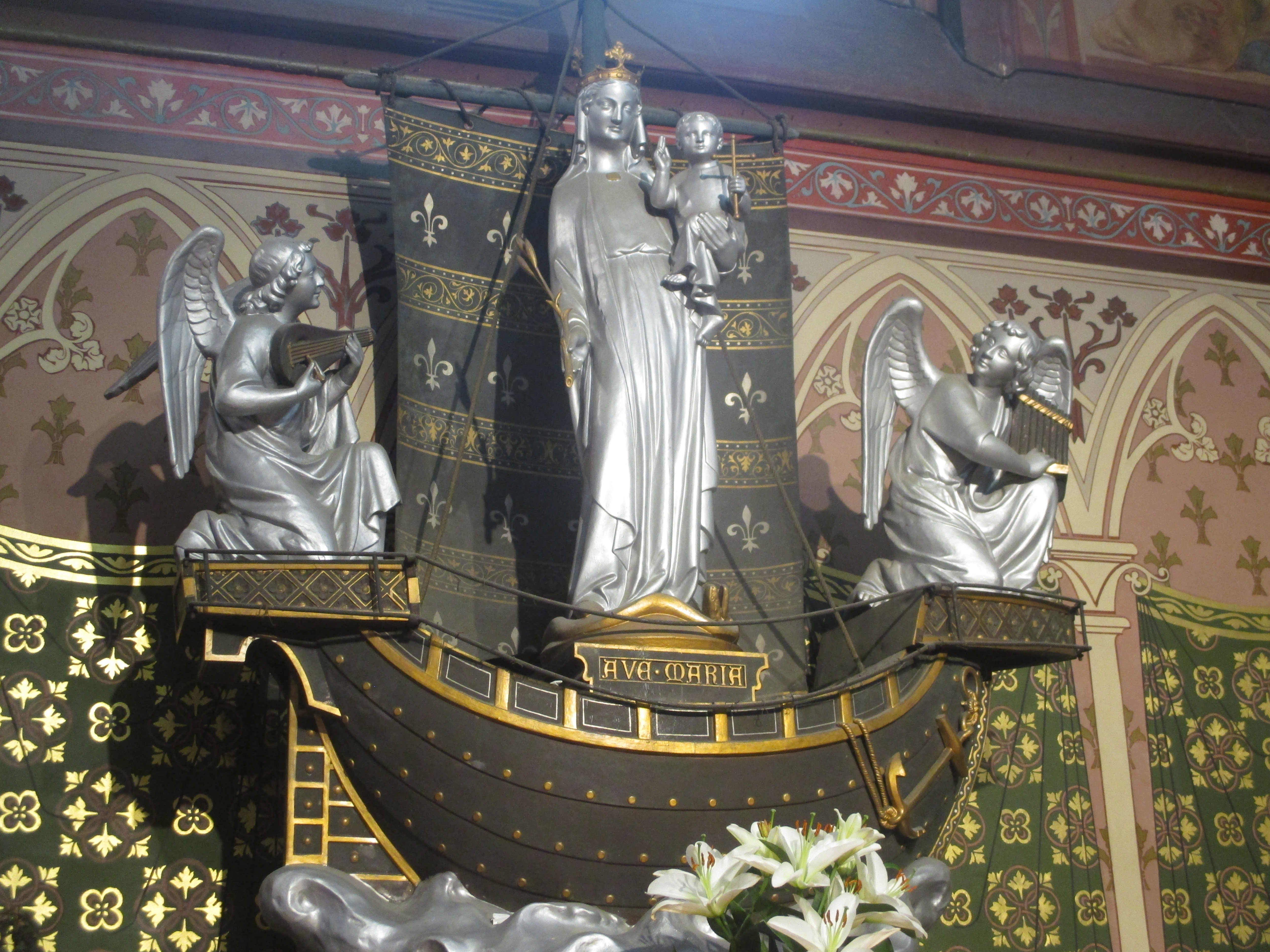 Statue de Notre-Dame de Boulogne, transept droit de l'église Notre-Dame de Boulogne.